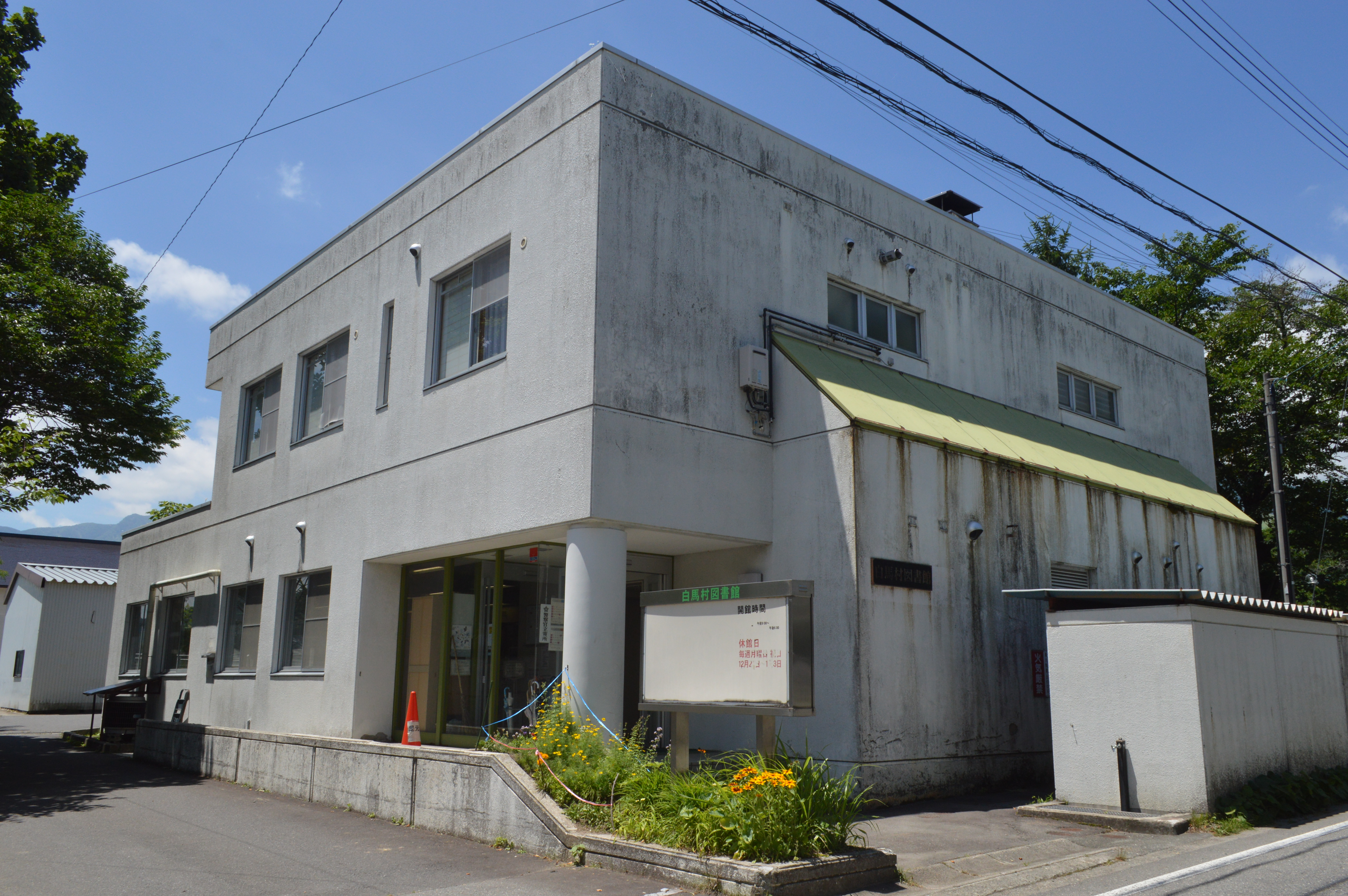 長野県北安曇郡白馬村の白馬村図書館。